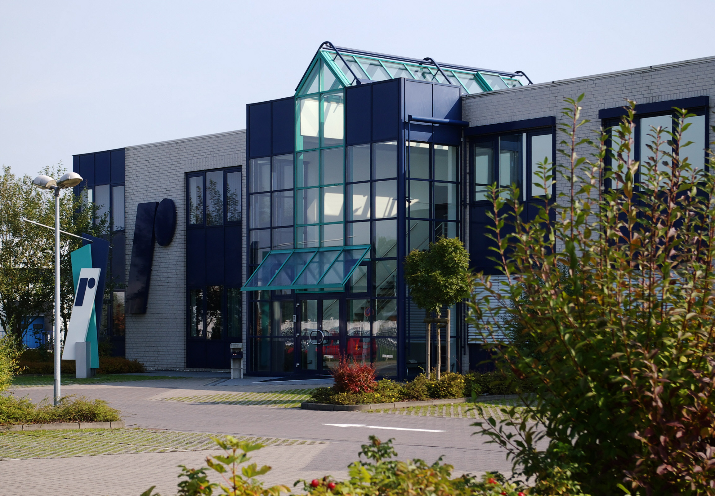 Elektronikversender Reichelt in Sande, Verwaltungstrakt